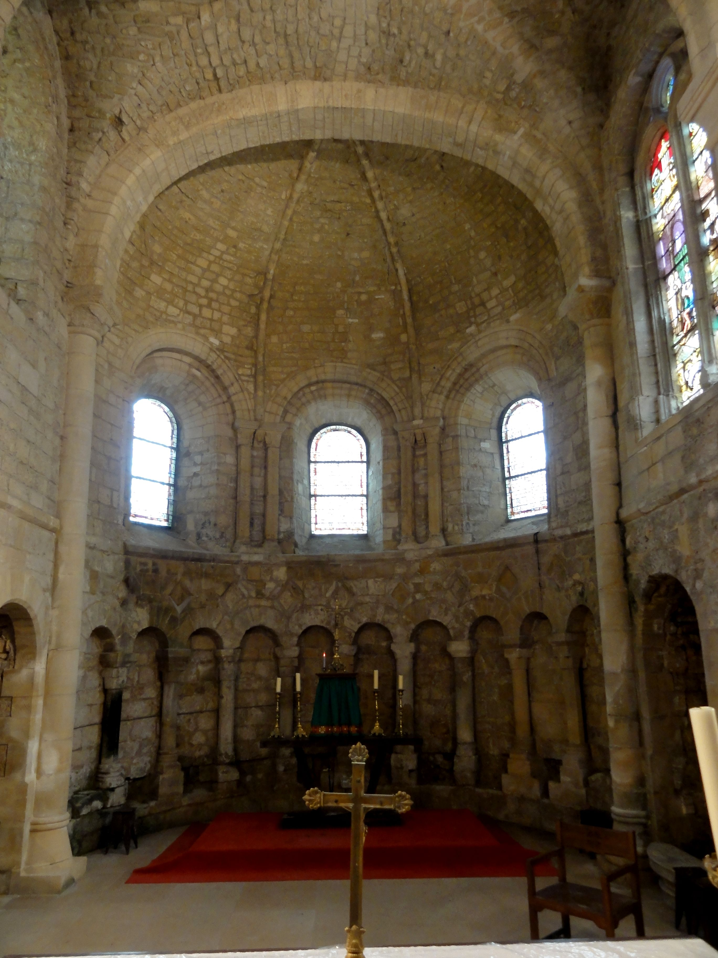 Abside.